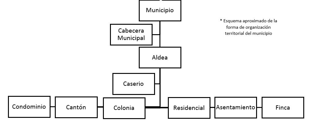 Esquema muy básico sobre la división territorial de acuerdo a contenido del municipio. elaborado en Word y recortado.